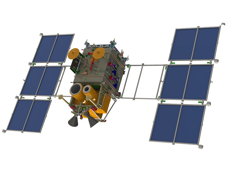 Schéma du satellite d'observation de la Terre russe Kanopus-V